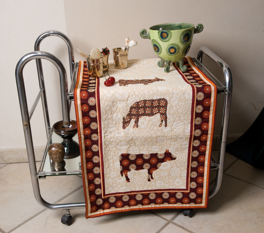 La mode est à la vache, c´est un design cultissime. en statut ou en nappe, vous pouvez rendre vos intérieurs contrastés entre la traditionnelle vache et ses couleurs fabulistiques. Ce chemin de table original et dans l´air du temps séduira les plus grands fans de vaches !